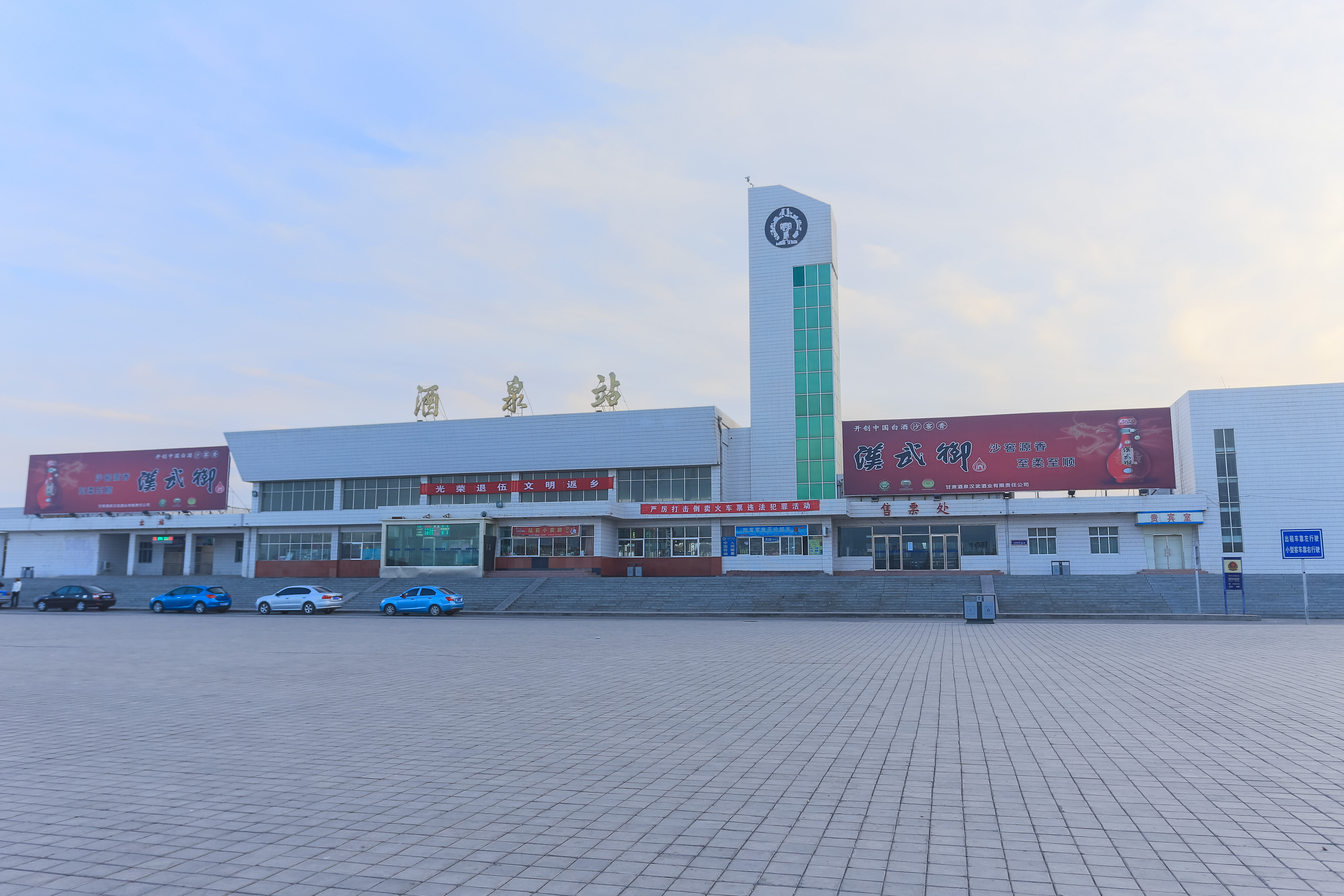 酒泉站